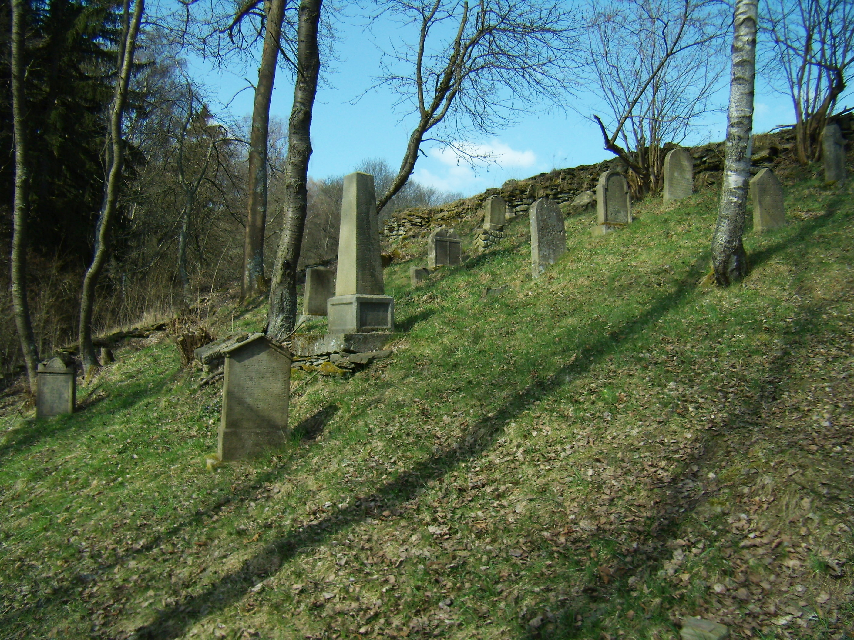 Kořen ŽH